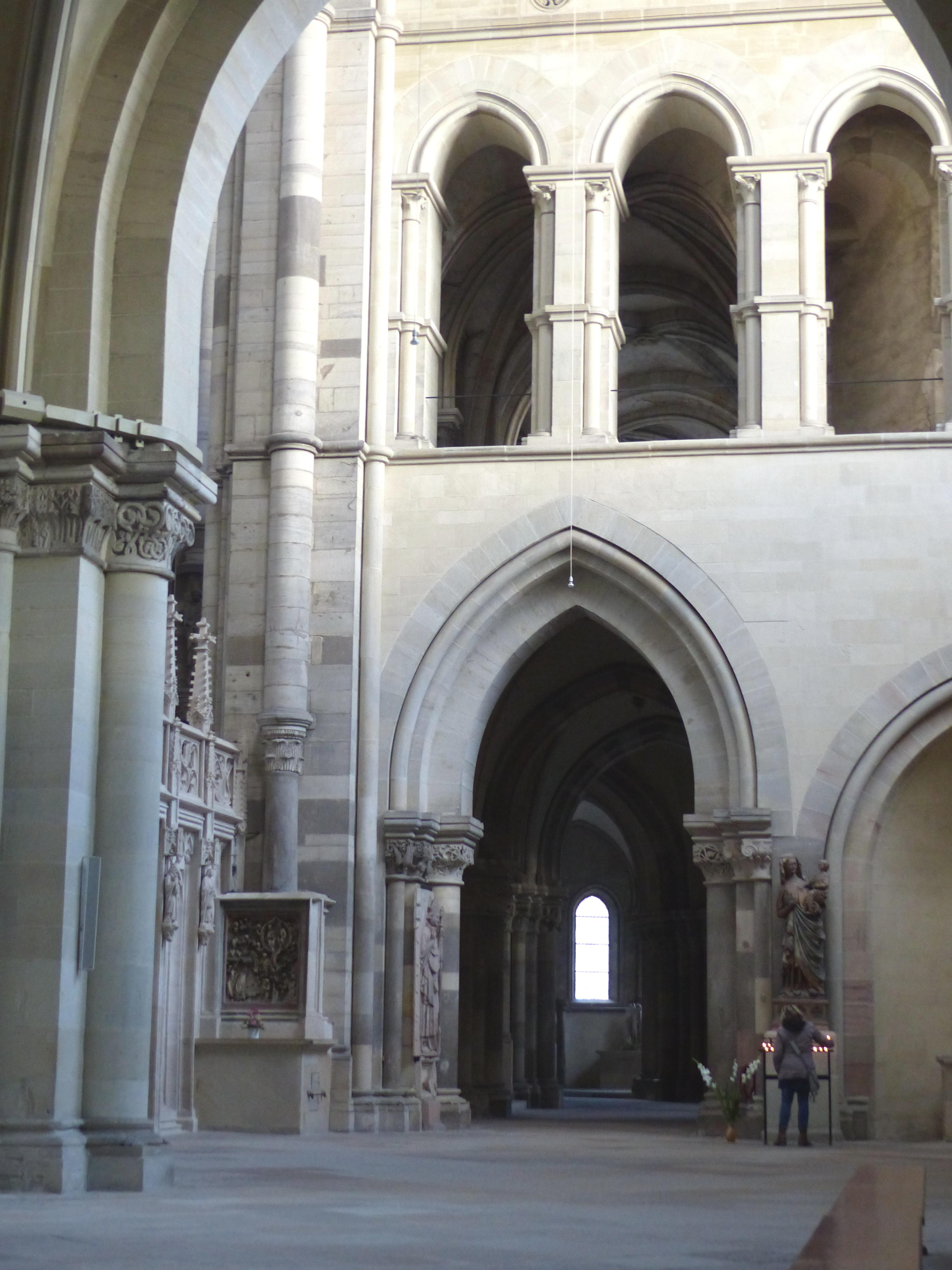 Magdeburger Dom: Abgang des Chorumgangs und der Chorempore vom südlichen Querhaus